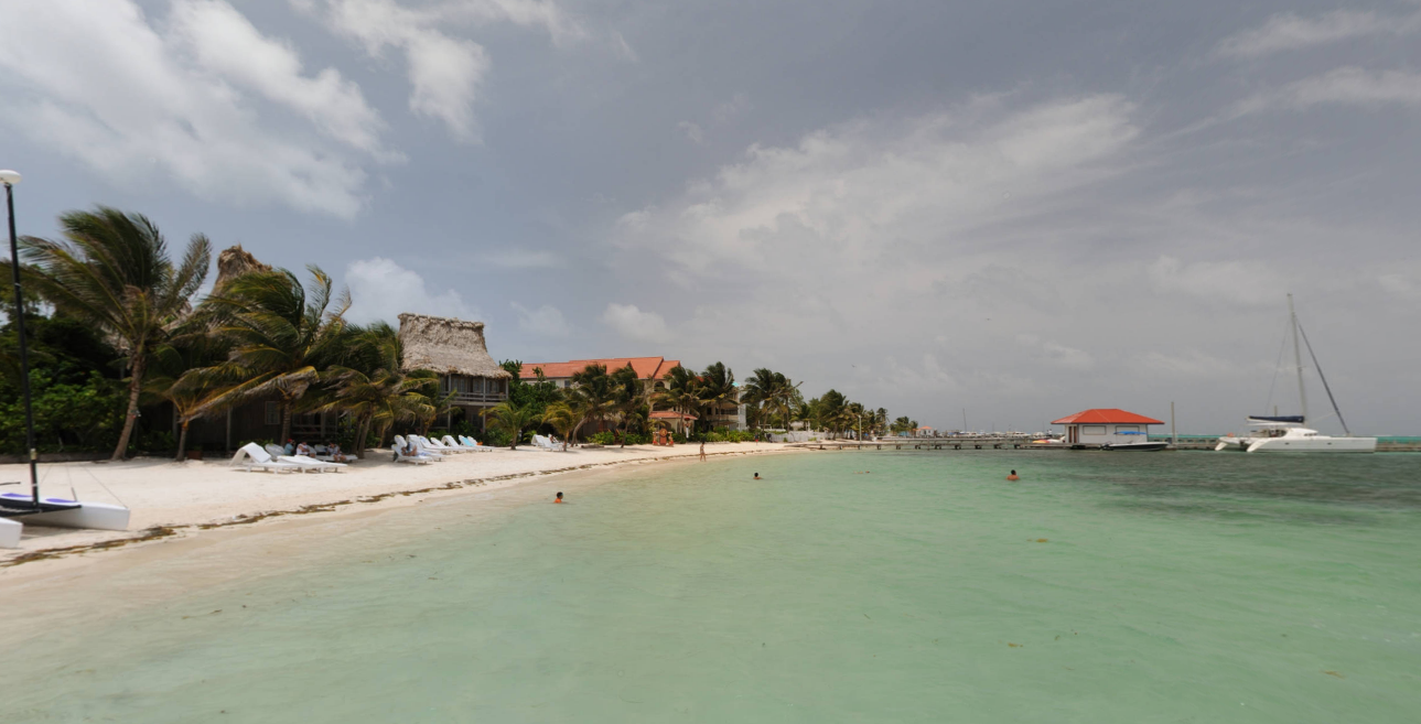 San Pedro Beach, Belize